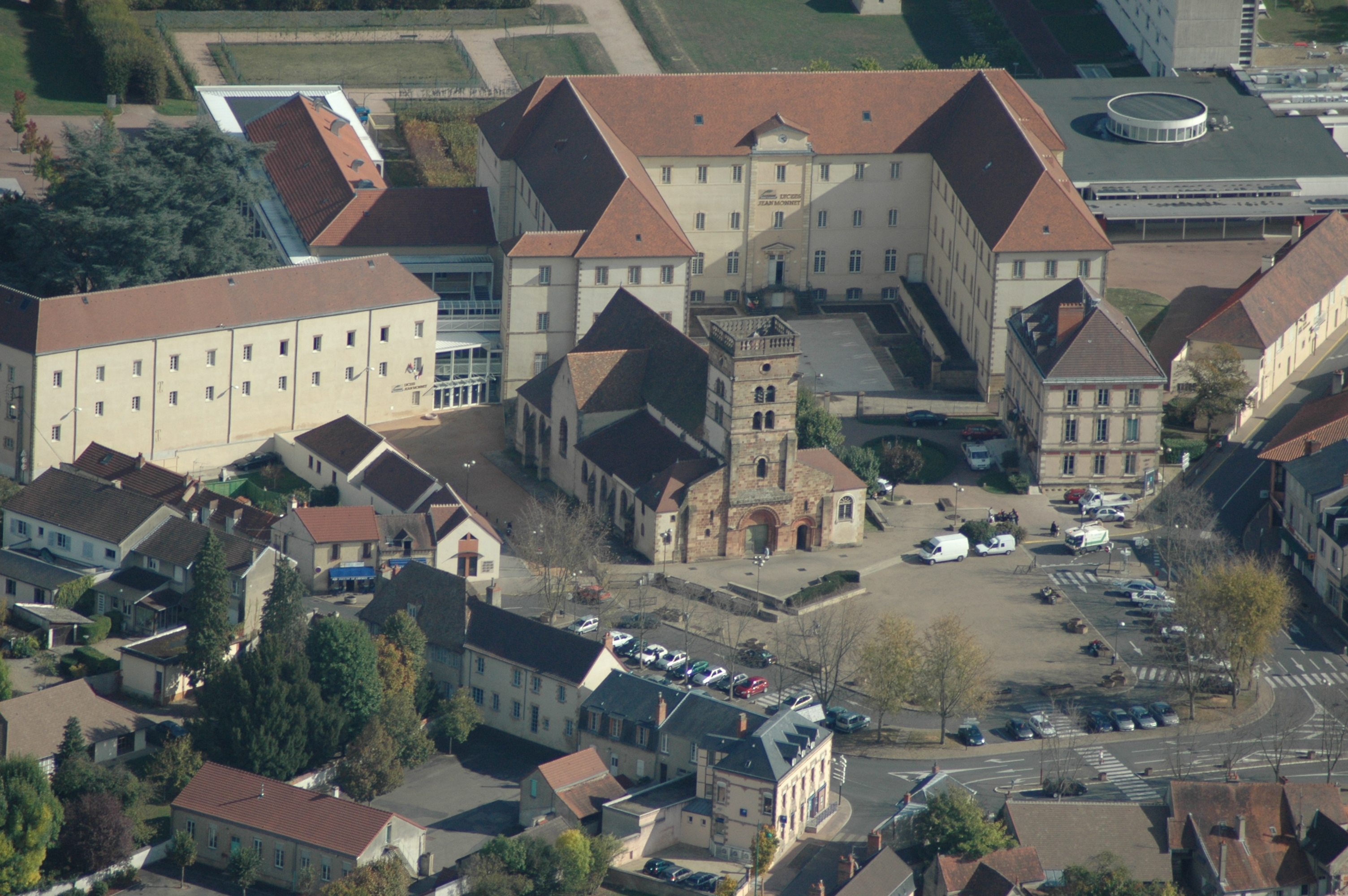 Vue aérienne sur le centre bourg d'Yzeure.